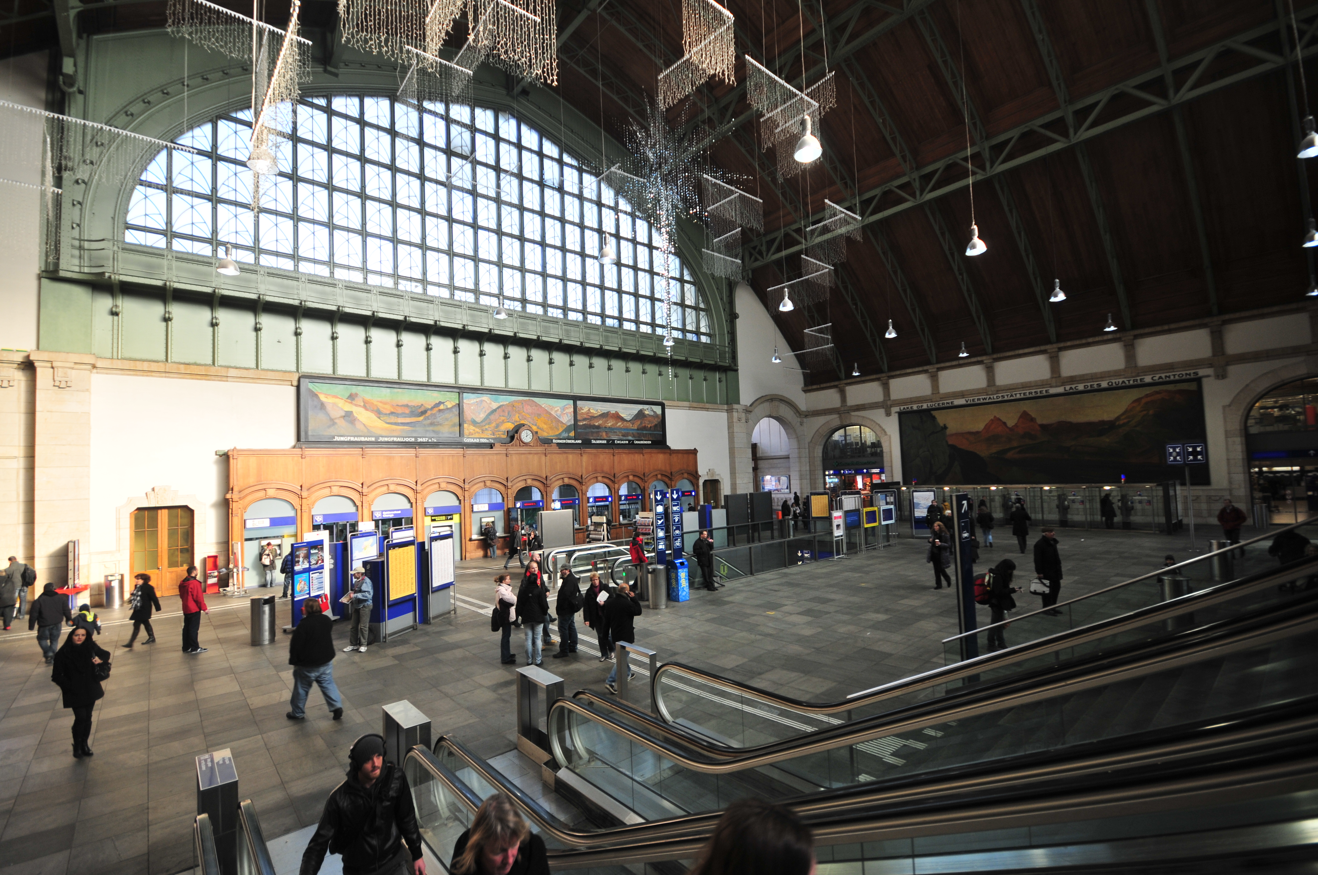 Basel